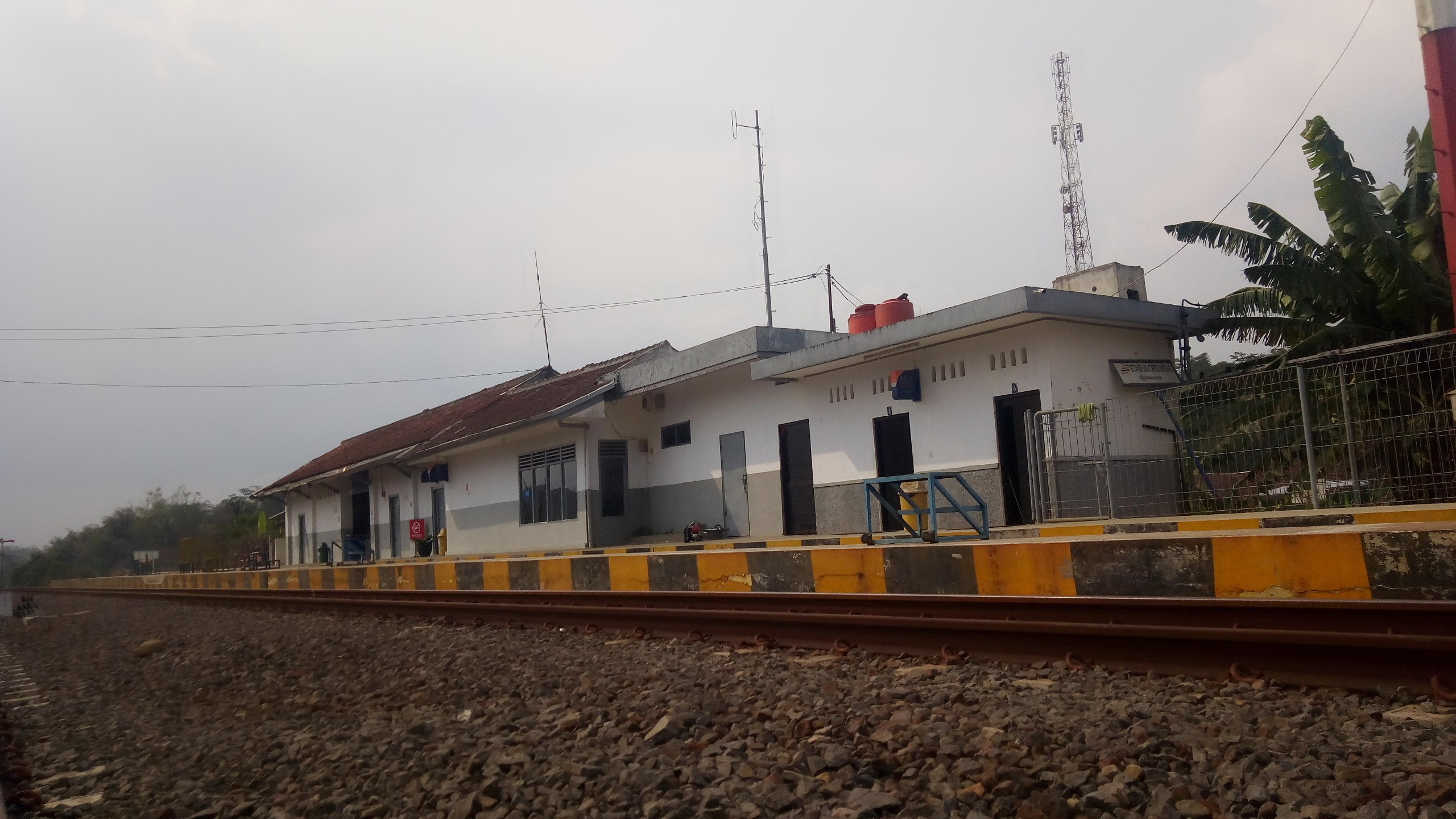 Stasiun Cireungas